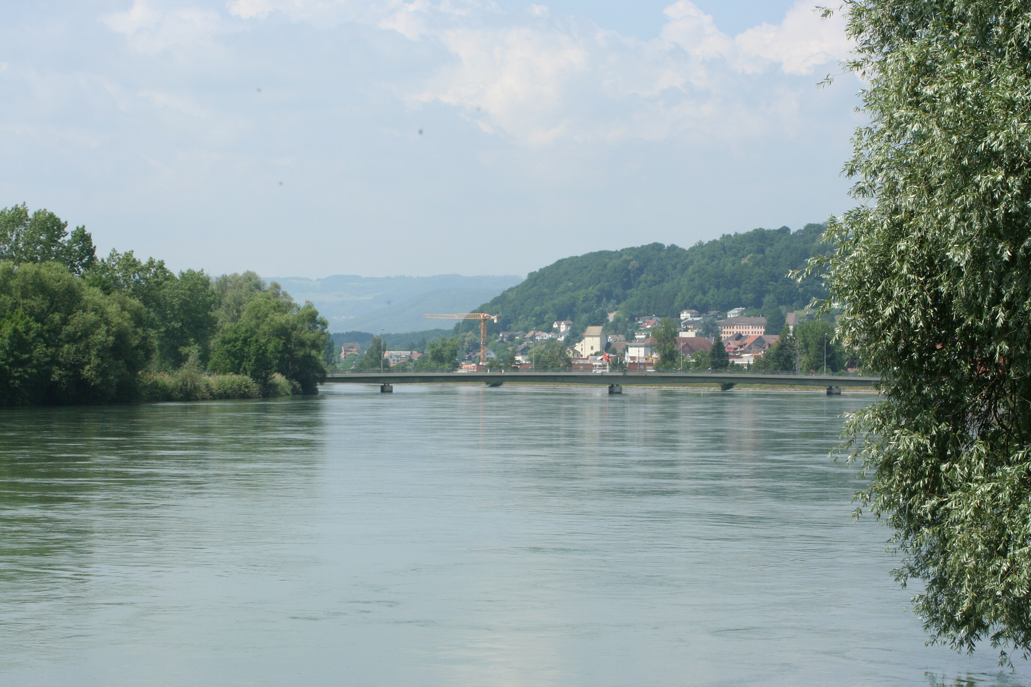 Aare Brücke Döttingen - Kleindöttingen